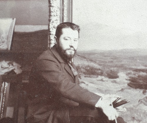 Photo de Fernand Stiévenart